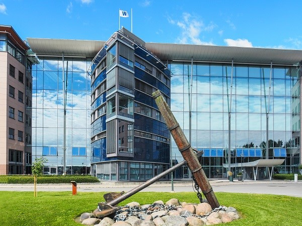 Wilhelmsens hovedkvarter på Lysaker i Bærum.